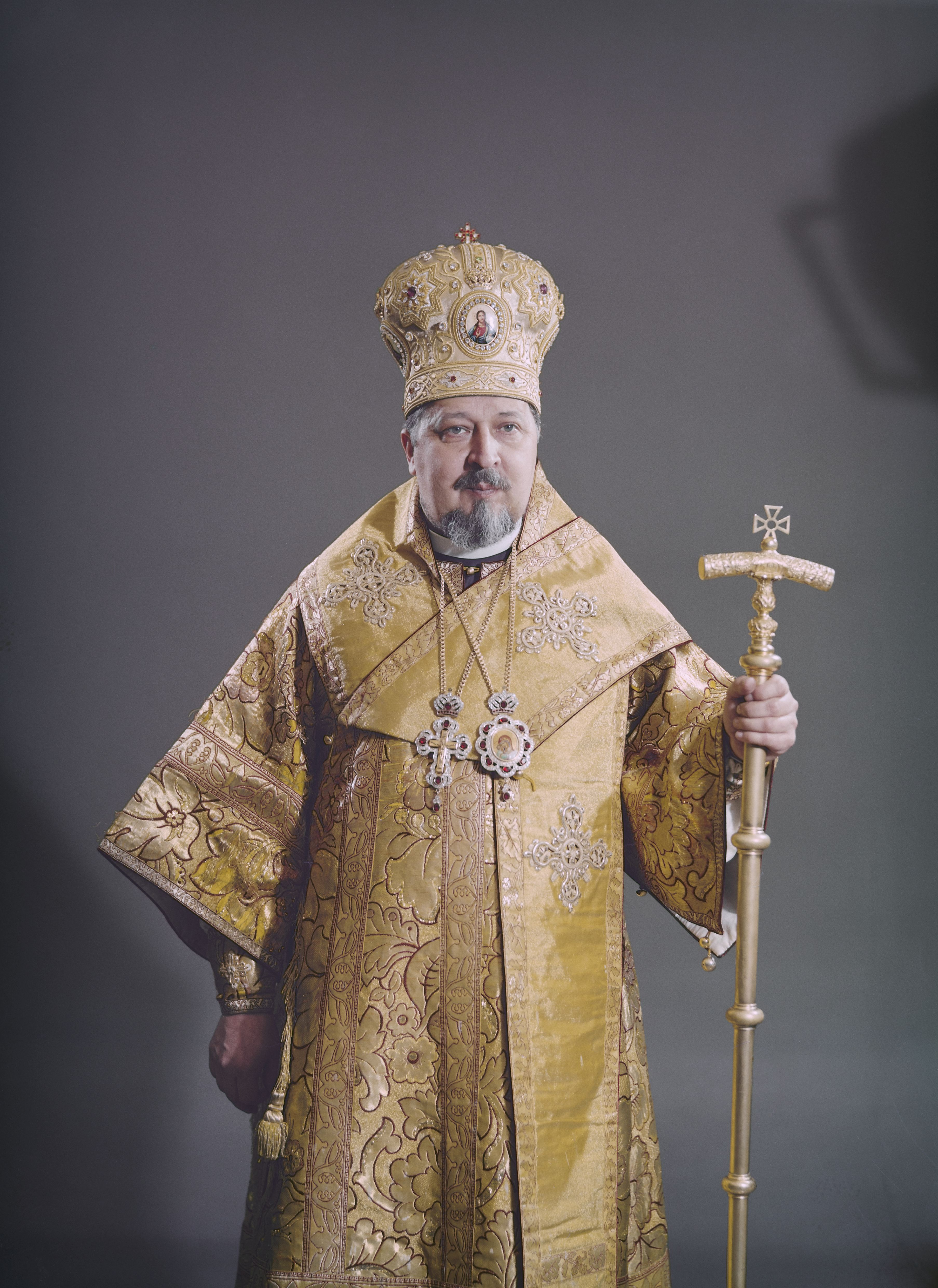 Архиепископ Иоанн (Ринне) в 1971 году